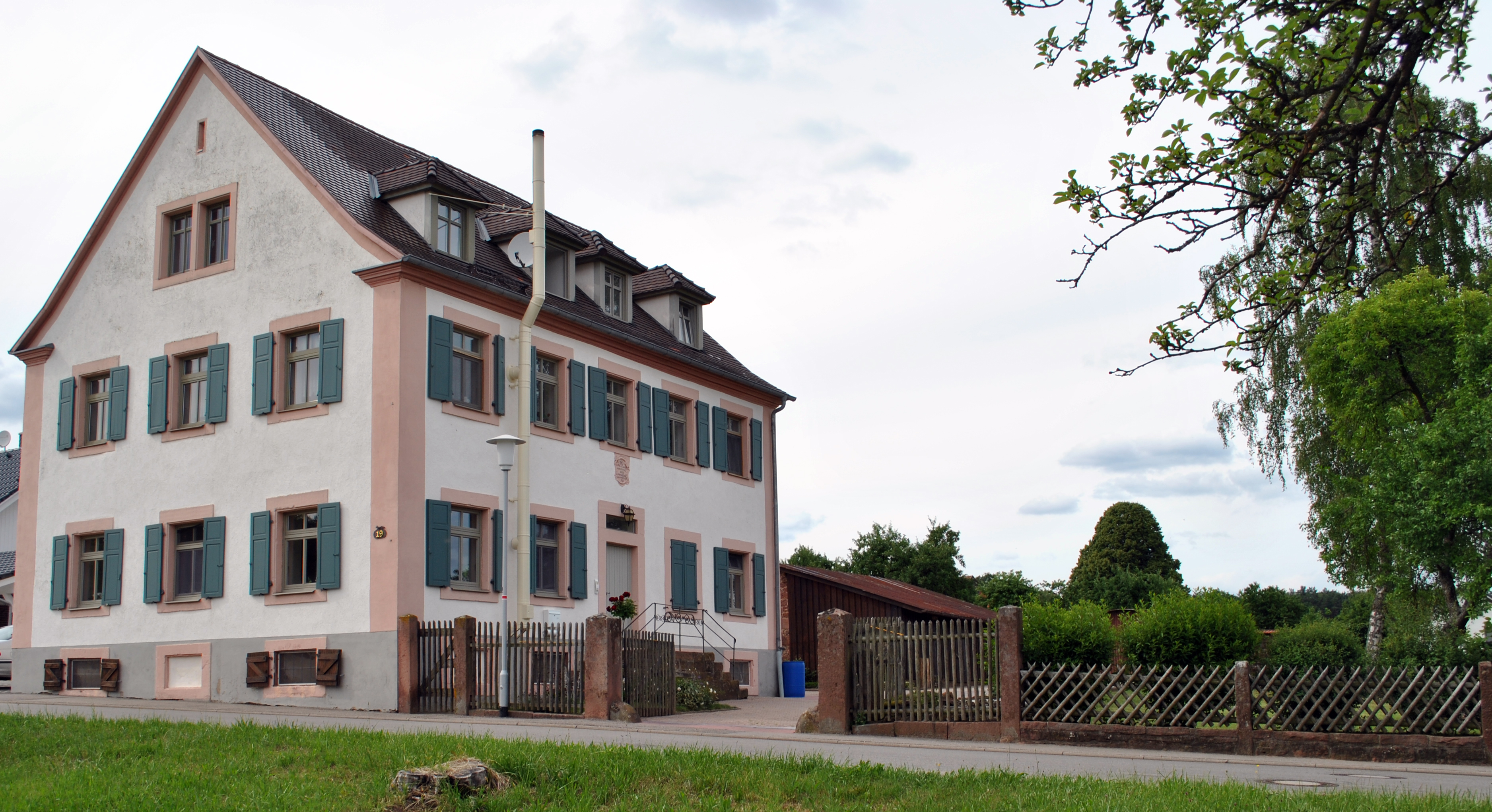 Vormaliges Jagdhaus des Abtes von Amorbach und späteres Pfarrhaus von Hesselbach aus dem Jahre 1768.